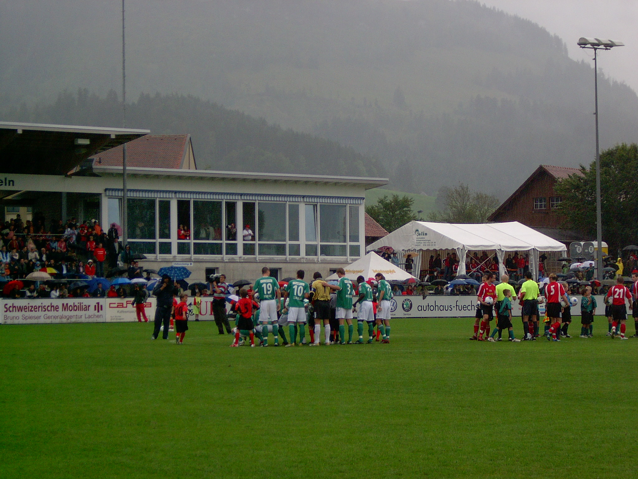 Erste Hauptrunde im Schweizer Cup 06/07